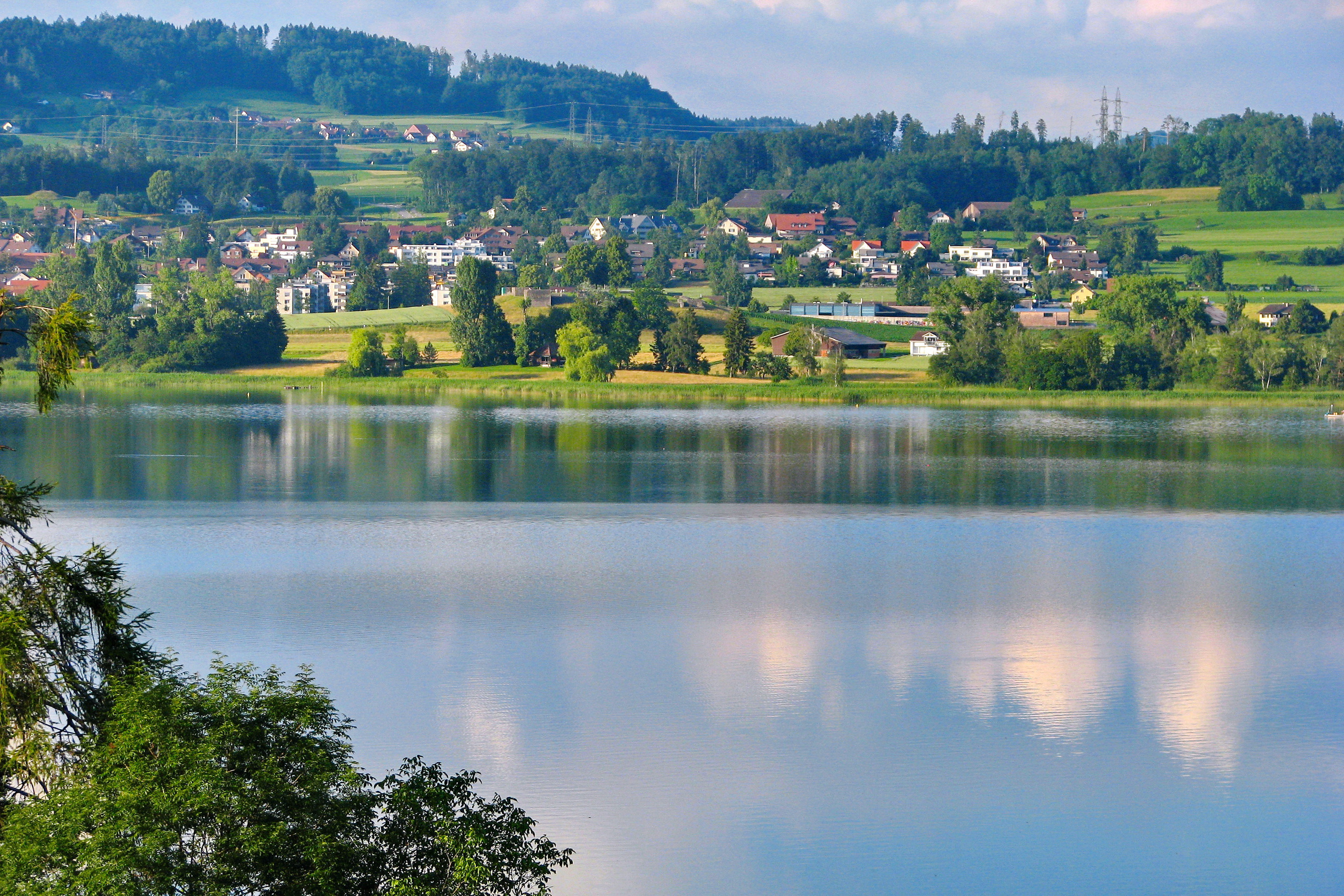 Irgenhausen (Pfäffikon) and its Roman castrum as seen from Seegräben.